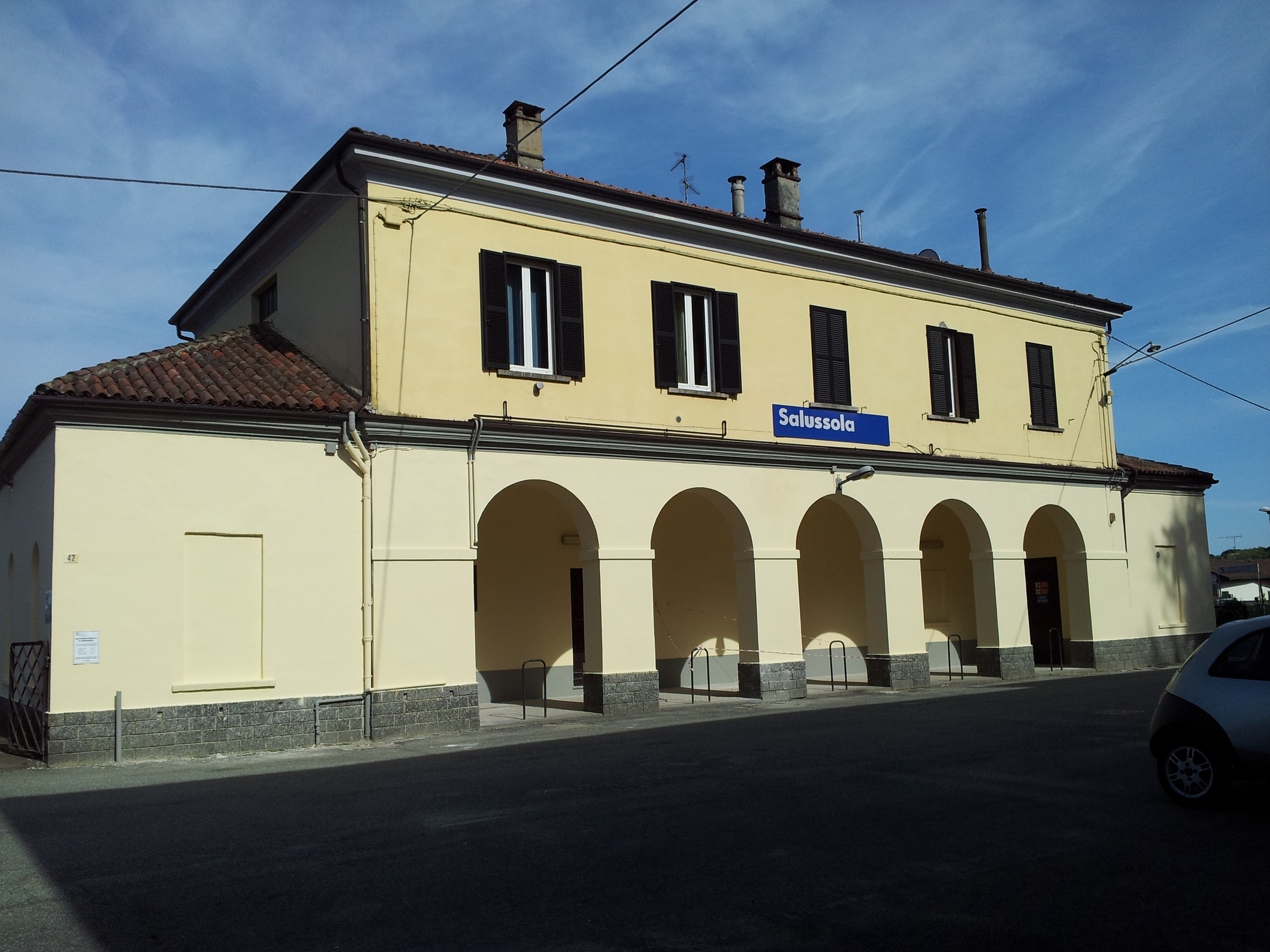 Stazione lato strada.